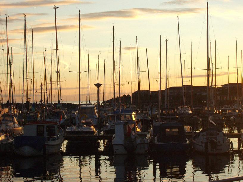 Ystad harbour